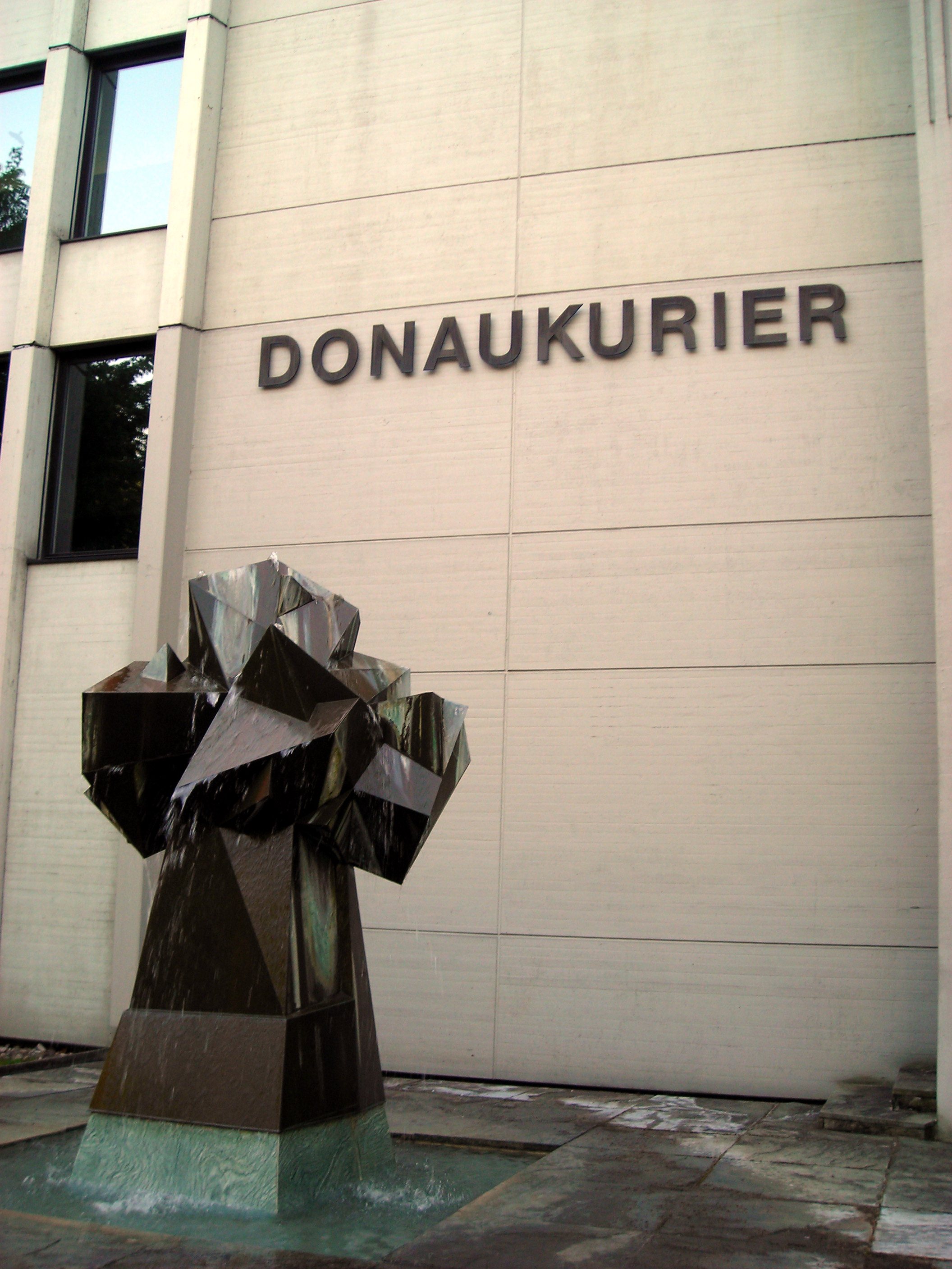 Schriftzug "Donaukurier" mit Brunnen vor dem Verlagsgebäude in Ingolstadt) Artist: Dr. Wilhelm Reissmüller, title: Kreuzblume, (1973)